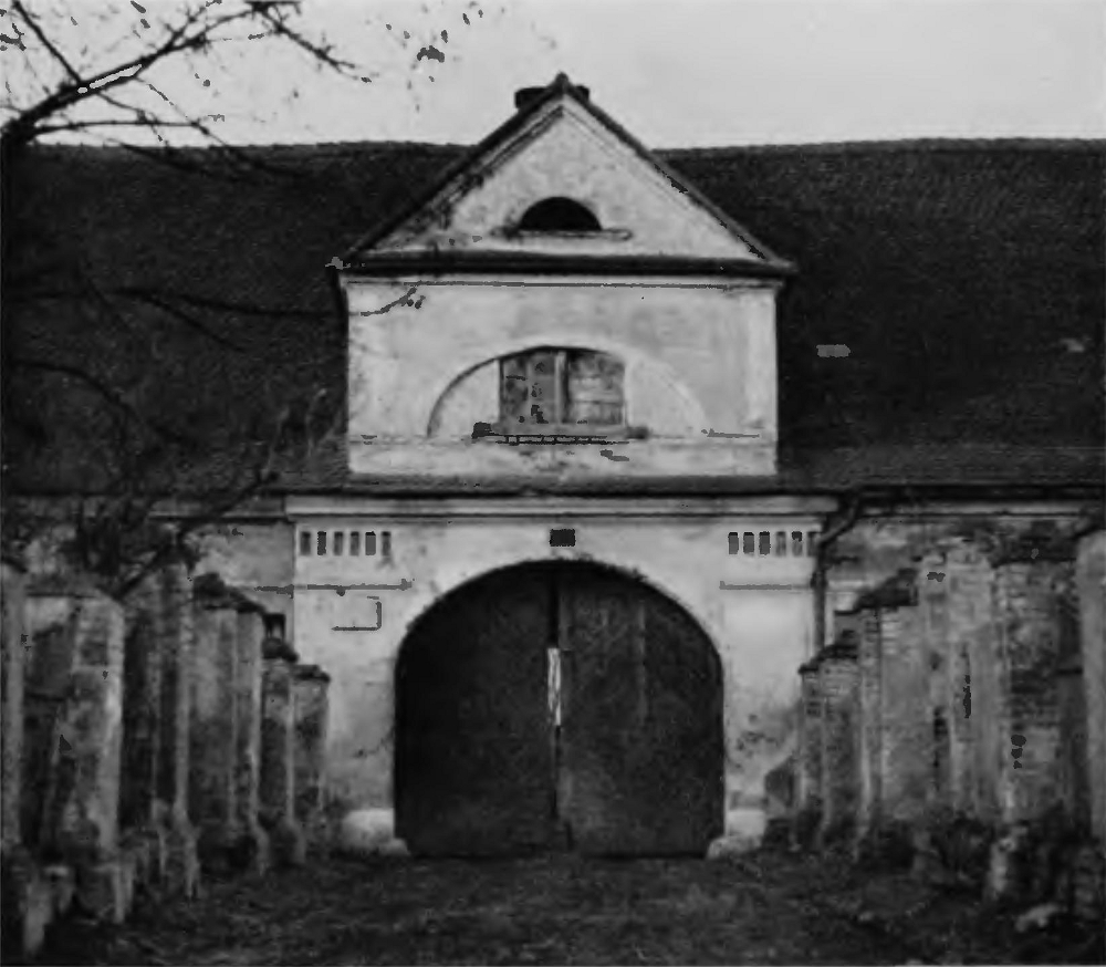 Einfahrt zum Gutshof in Schönwald bei Rosenberg in Oberschlesien.